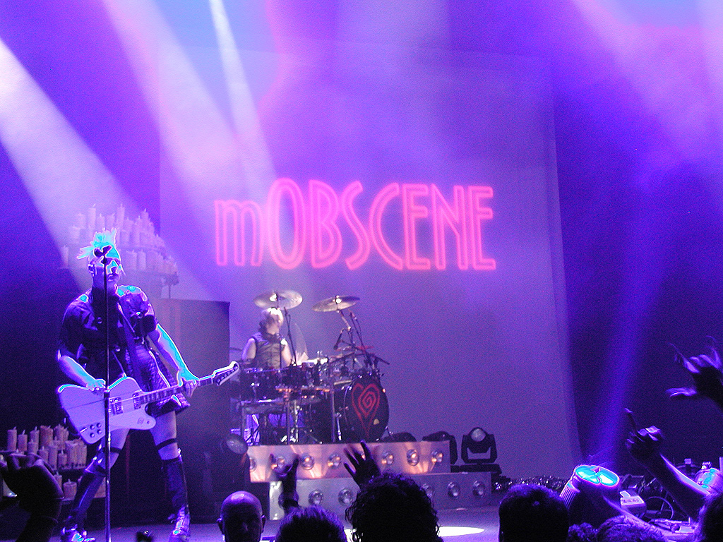 cancion mobscene